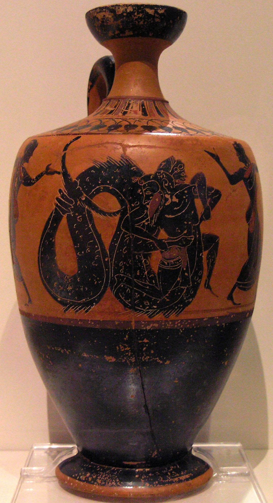 Lekythos de Corinthe, vers 530 av. J.-C. Héraclès combattant Triton. Musée archéologique national, Athènes, n°524.